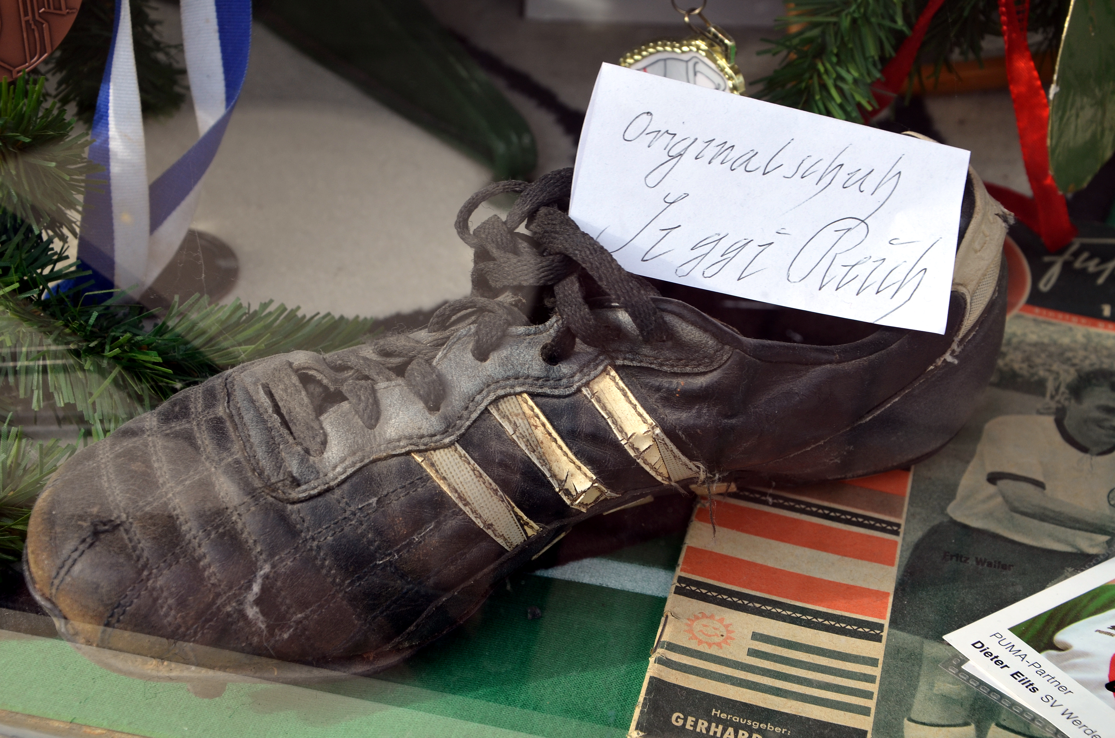 Im Schaufenster des Lädchens Presse Tabak Lotto im Haus Nelkenstraße 32 am Engelbosteler Damm in Hannover findet sich unter anderem dieser „Originalschuh Siggi Reich“; der Fußballspieler trug diesen Sportschuh der Marke Adidas am rechten Fuß ...